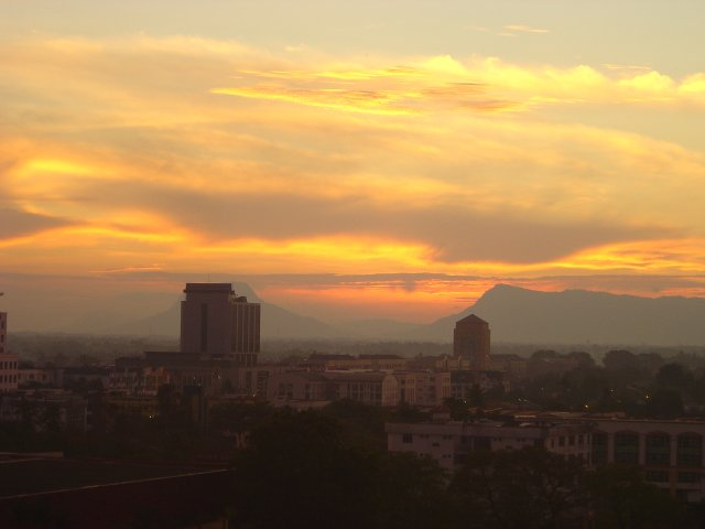 Sunset in Kuching, Sarawak.